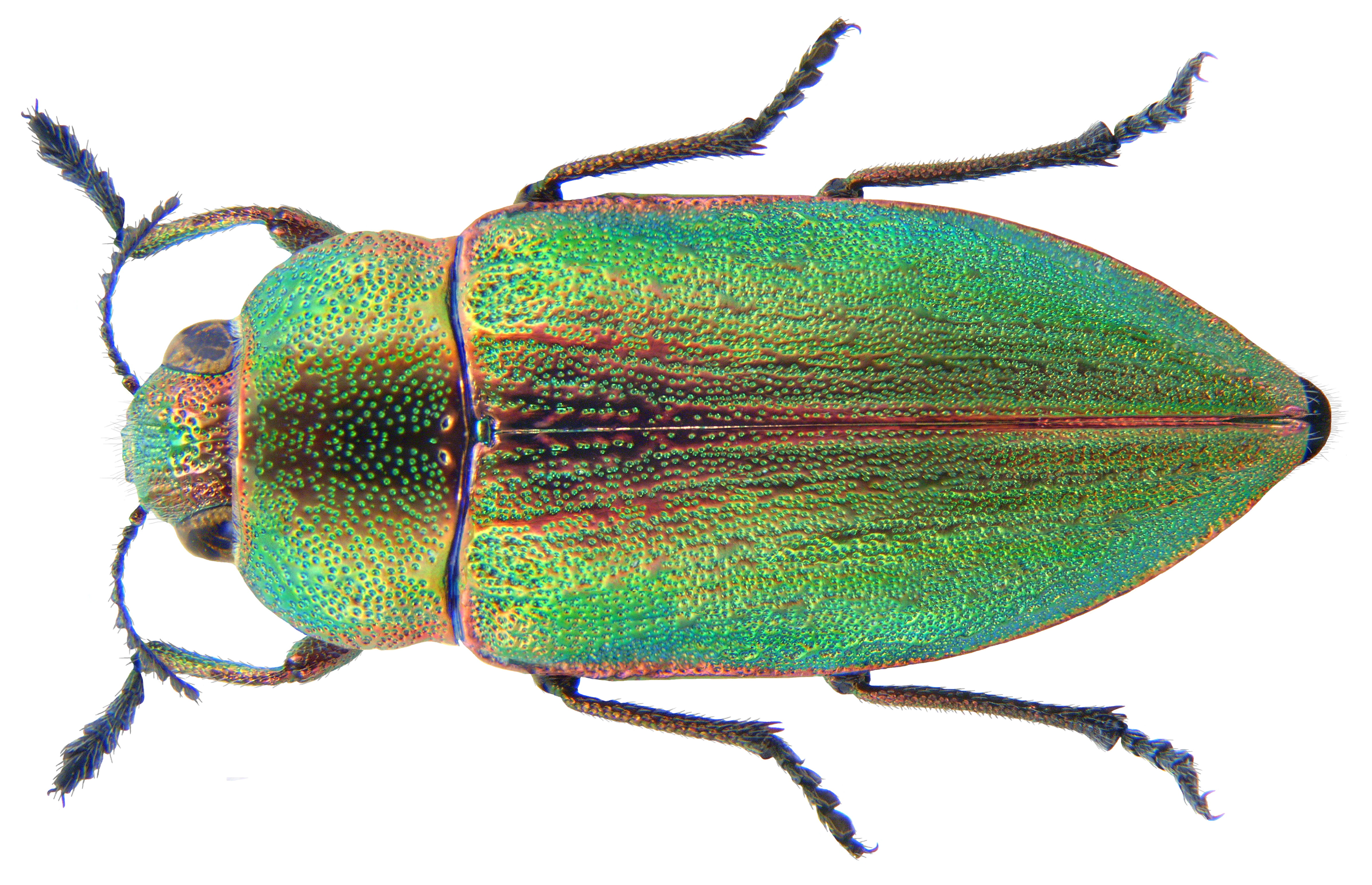 Familie: Buprestidae Grösse: 17,7 mm Fundort: Türkei, Prov. Mersin, Erdemli leg. A.Skale, 2002; det. M.Niehuis, 2002 Foto: U.Schmidt, 2009